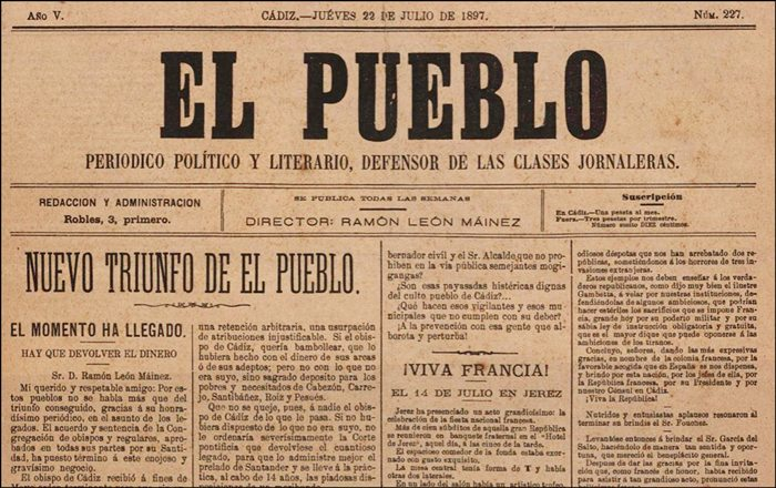 Portada diario el Pueblo dirigido por Ramón León Maínez Fernández